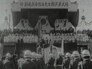 한국의 제2대 부통령 김성수 국민장 장례식